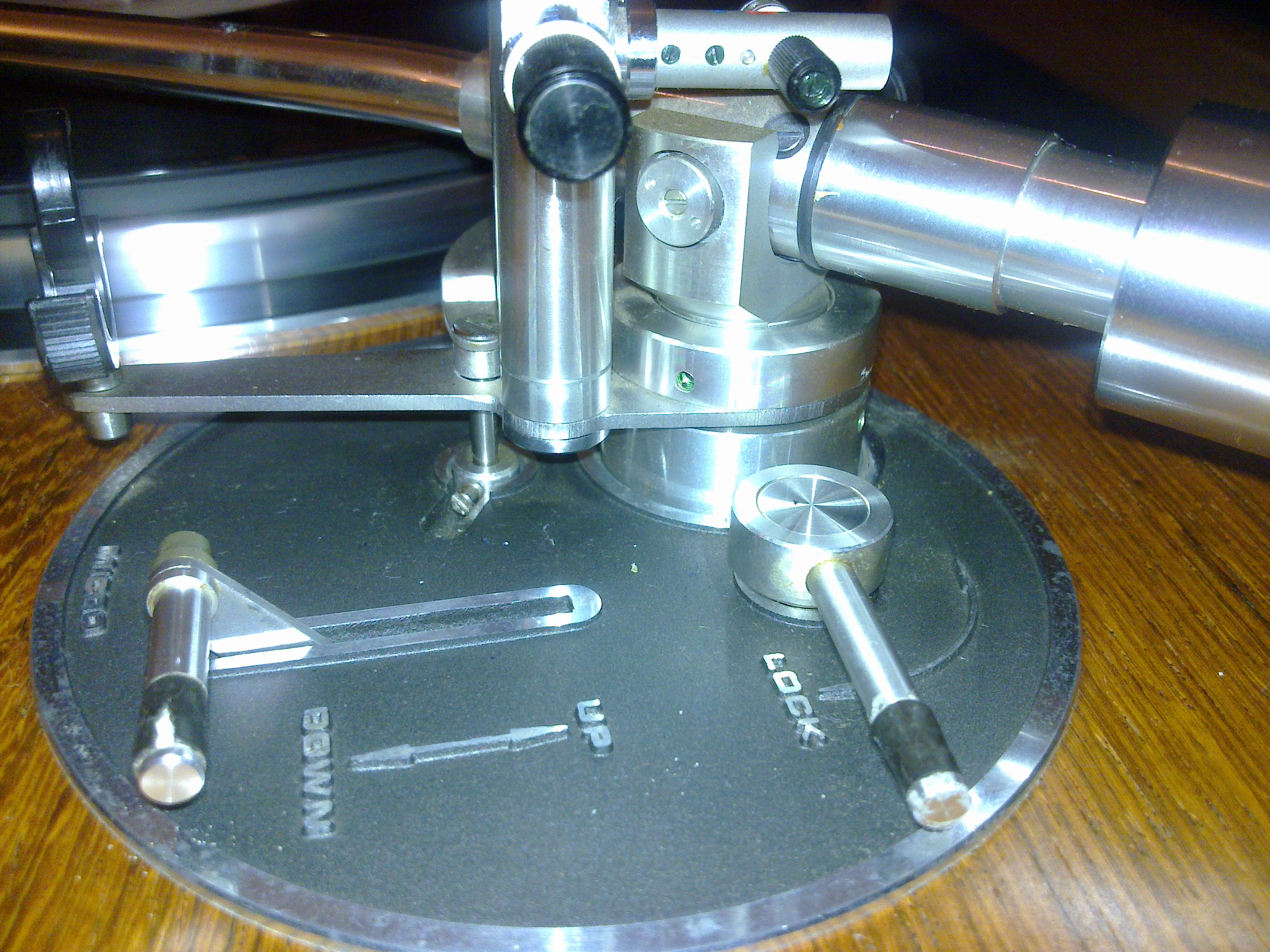 Micro Seiki DD-40 / MA 505s